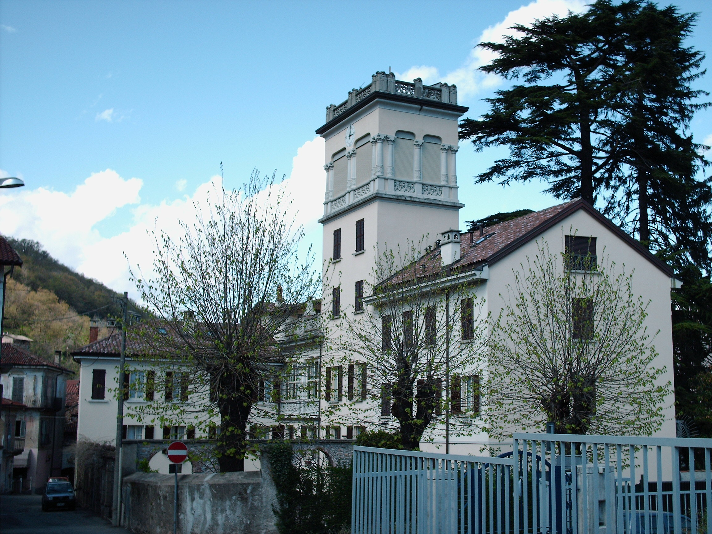 Villa Battaglia di Brusimpiano, dopo la ristrutturazione.